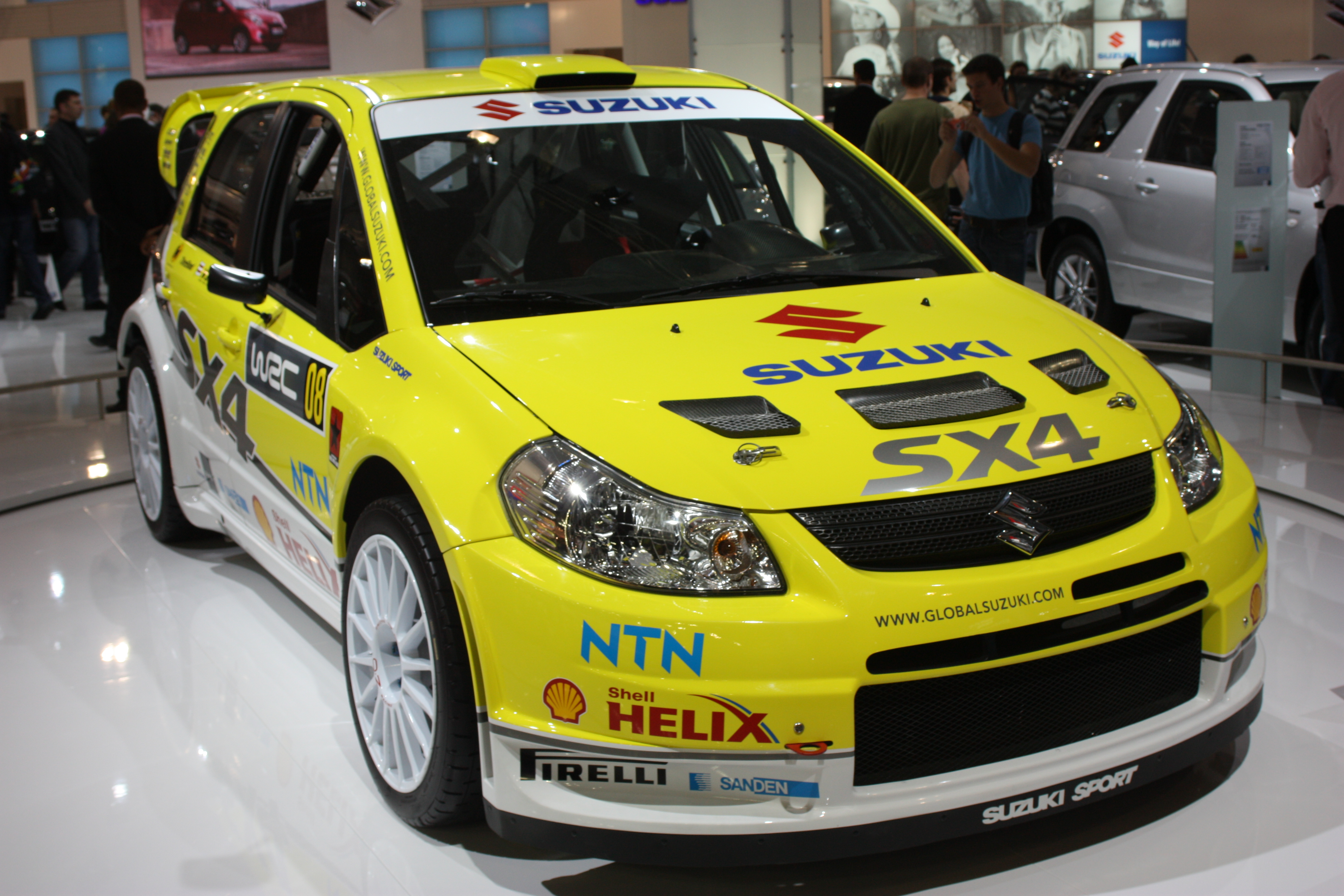 Mondial de l'automobile - Paris - Dimanche 5 Octobre 2008 Mondial de l’Automobile de Paris, 5 October 2008.